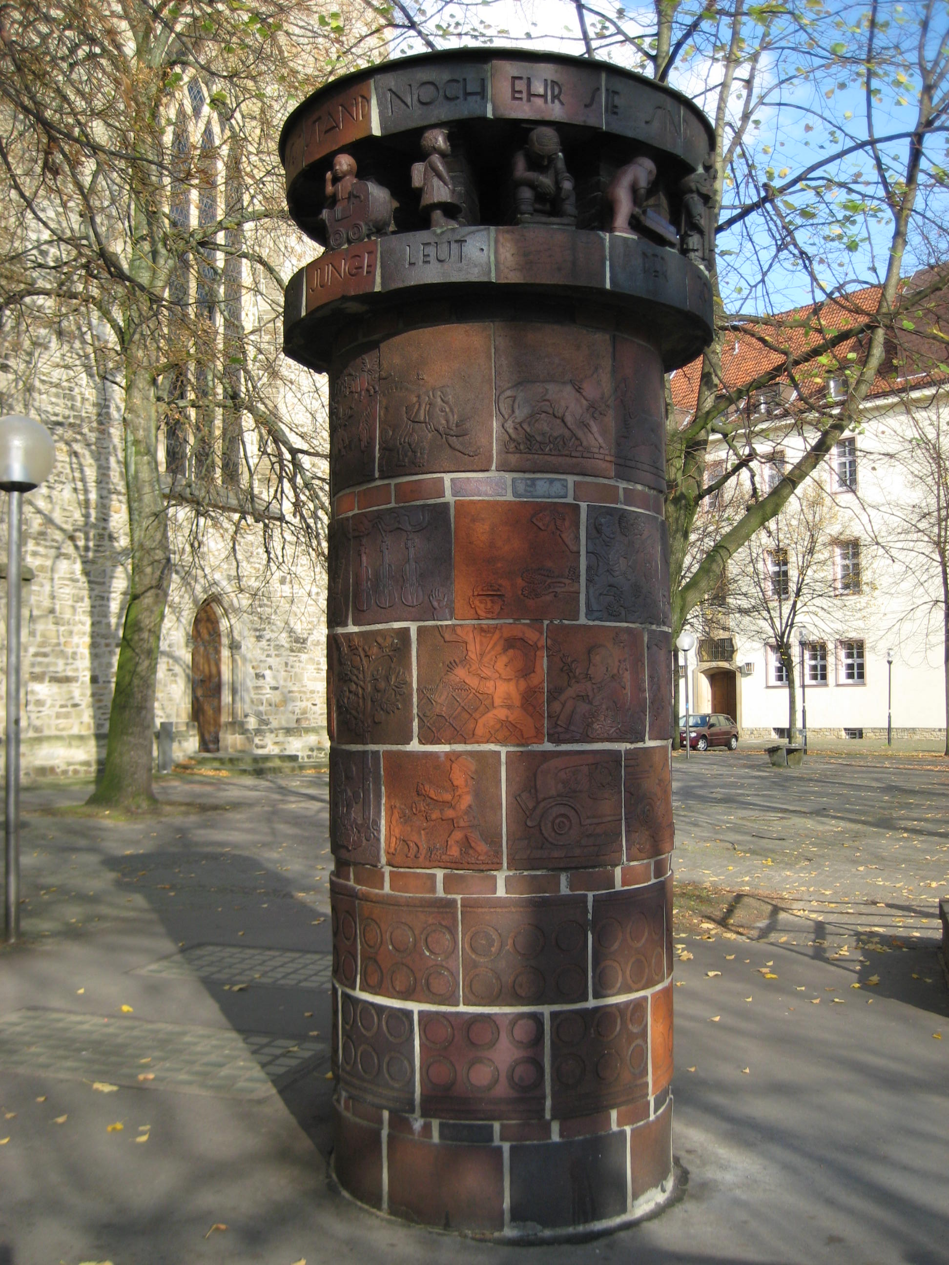 Unter Denkmalschutz stehende Abluftsäule in der Neustadt von Osnabrück, an St. Johannis